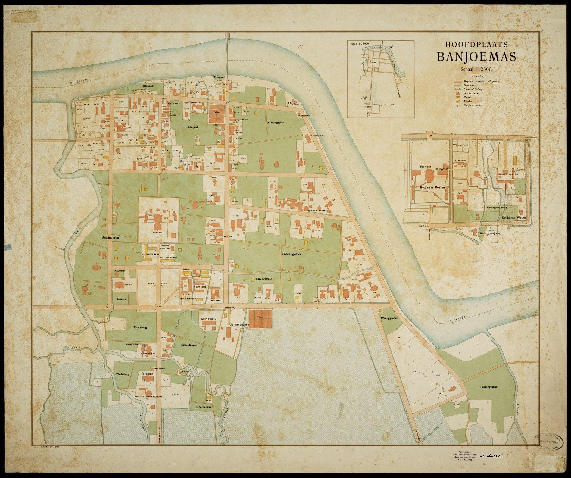 Peta Kecamatan Banyumas Jaman Hindia Belanda.